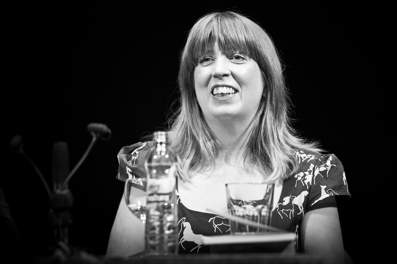 Měsíc autorského čtení 2014